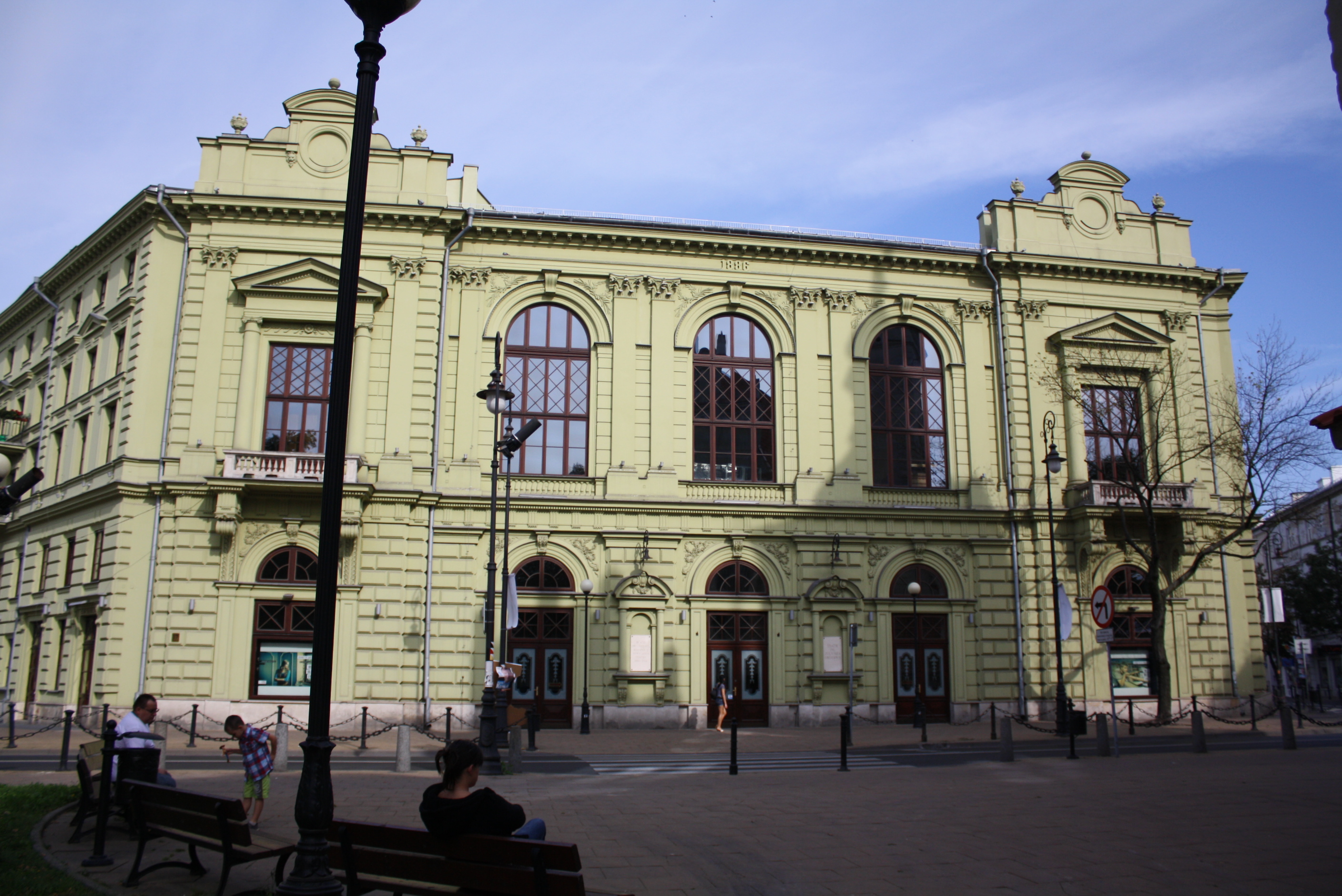 Lublin - Teatr im. J. Osterwy, ul. Narutowicza 17